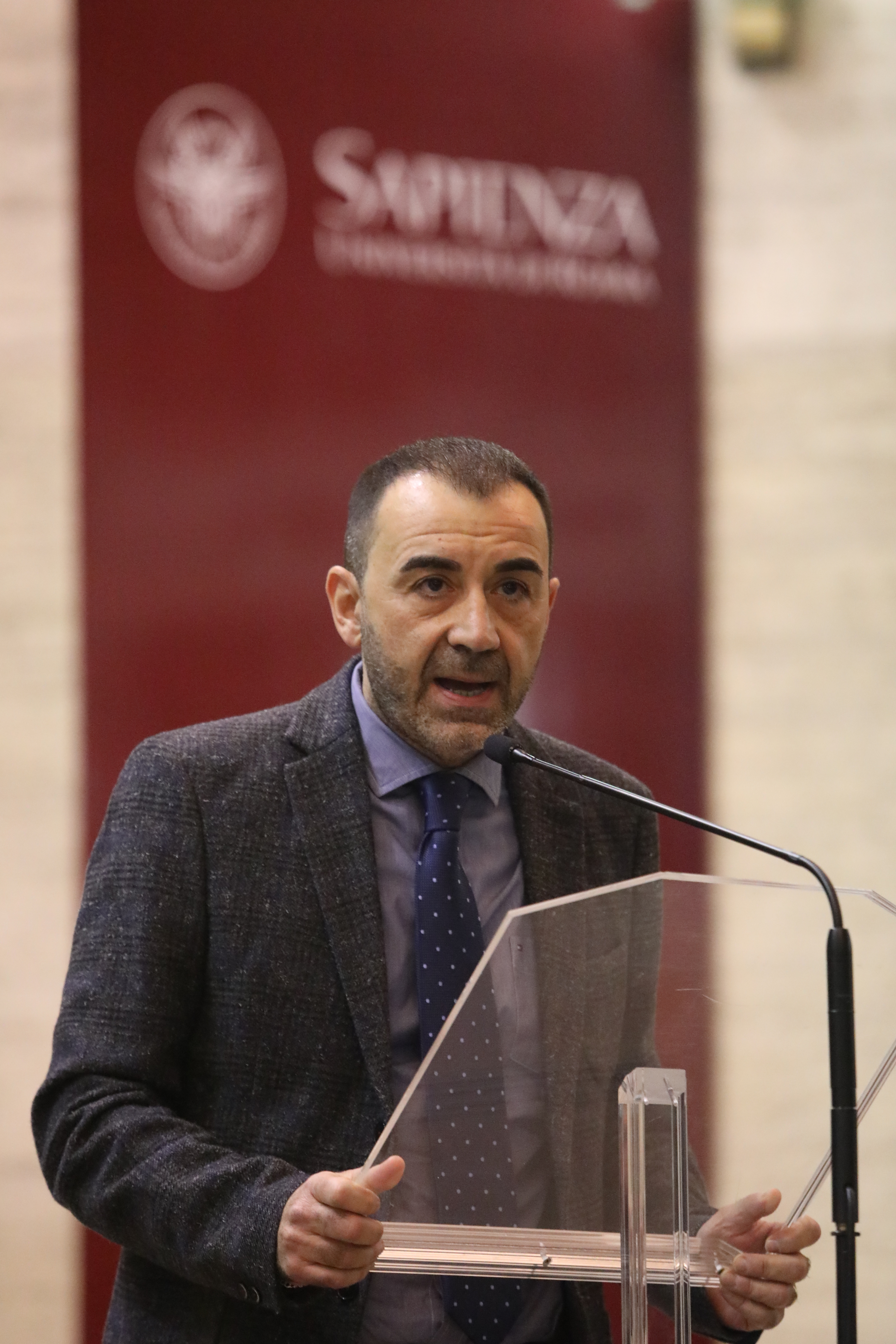 Intervento all'Università La Sapienza, Roma